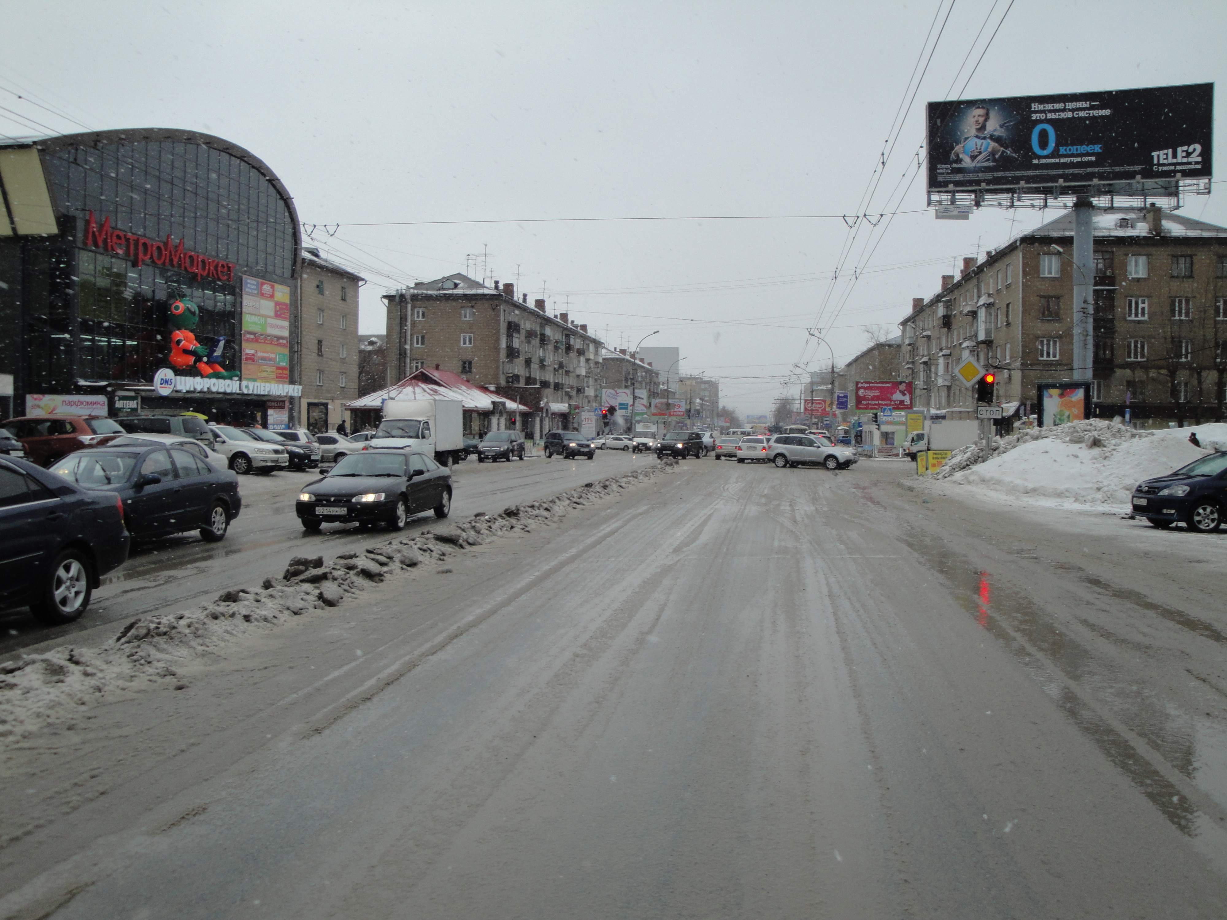 Проспект Карла Маркса, Новосибирск. Вид от метро «Студенческая» в сторону Коммунального моста.